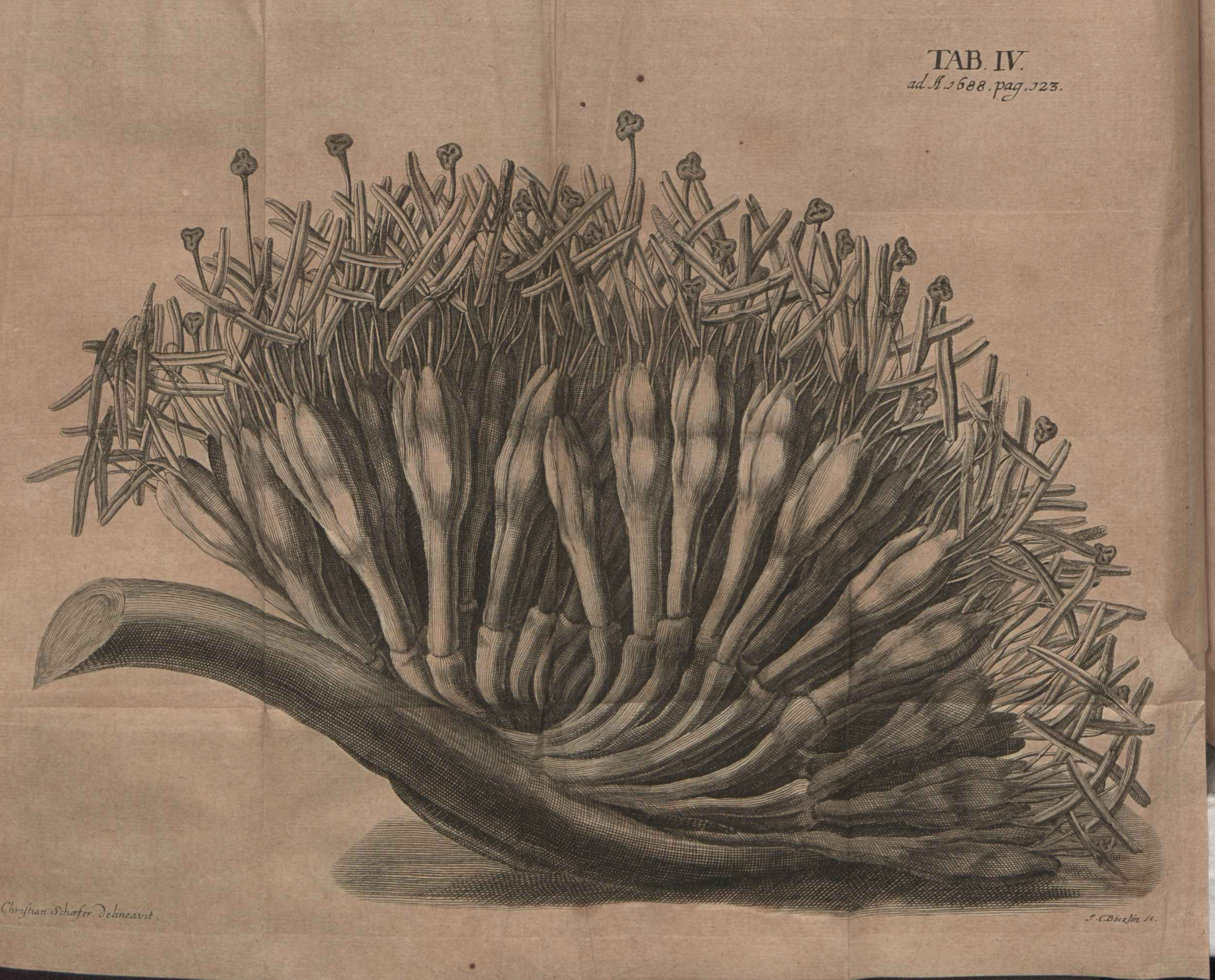 Illustration